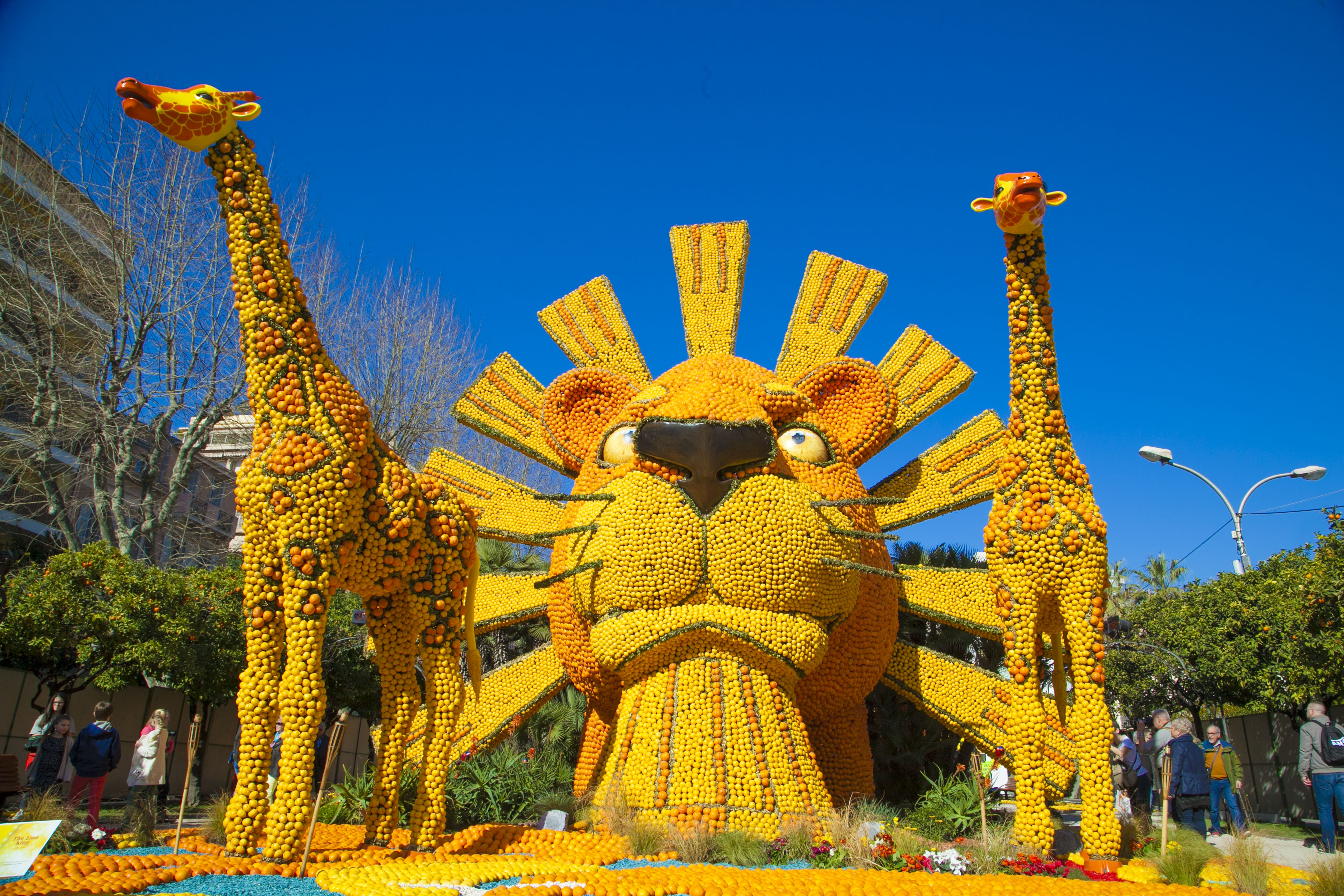 photographie d'un motif dans les jardins biovès pour la 84ème Fête du Citron®